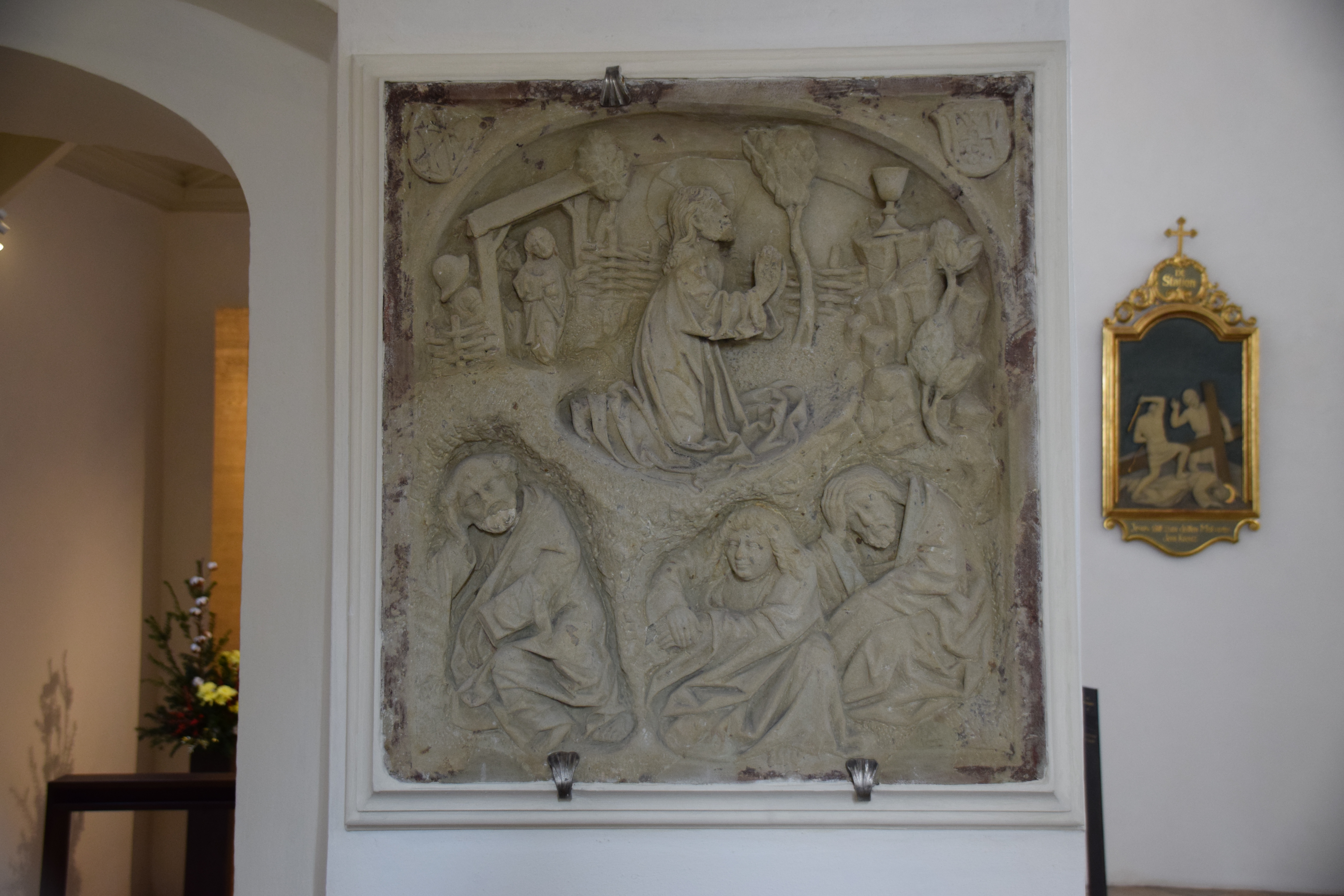 Ölbergrelief aus Regensburger Grünsandstein in der Stiftspfarrkirche St. Kassian in Regensburg